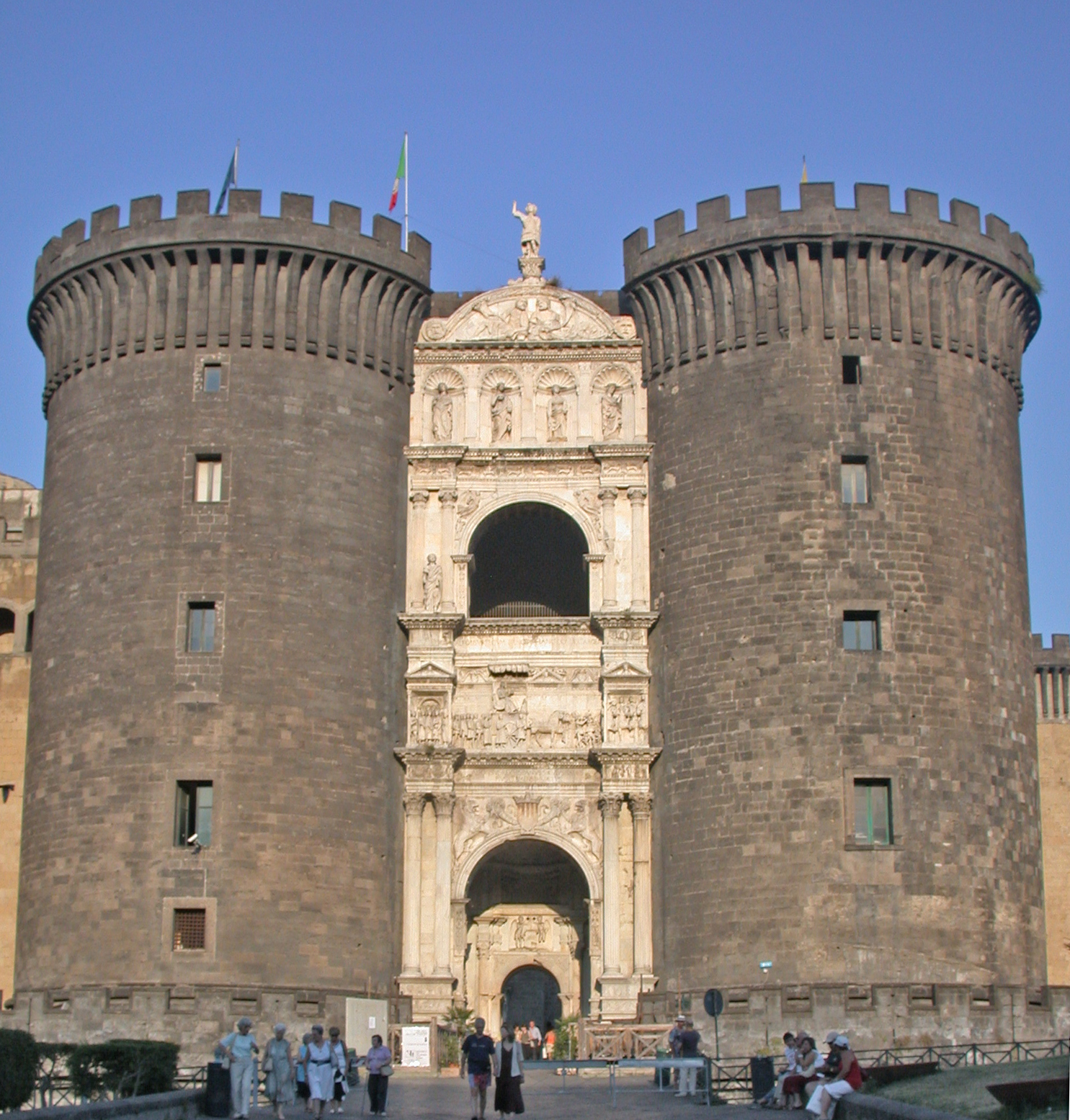 Italia, Campania, Napoli, Castel Nuovo o Maschio Angioino, arco trionfale di ingresso, vista generale